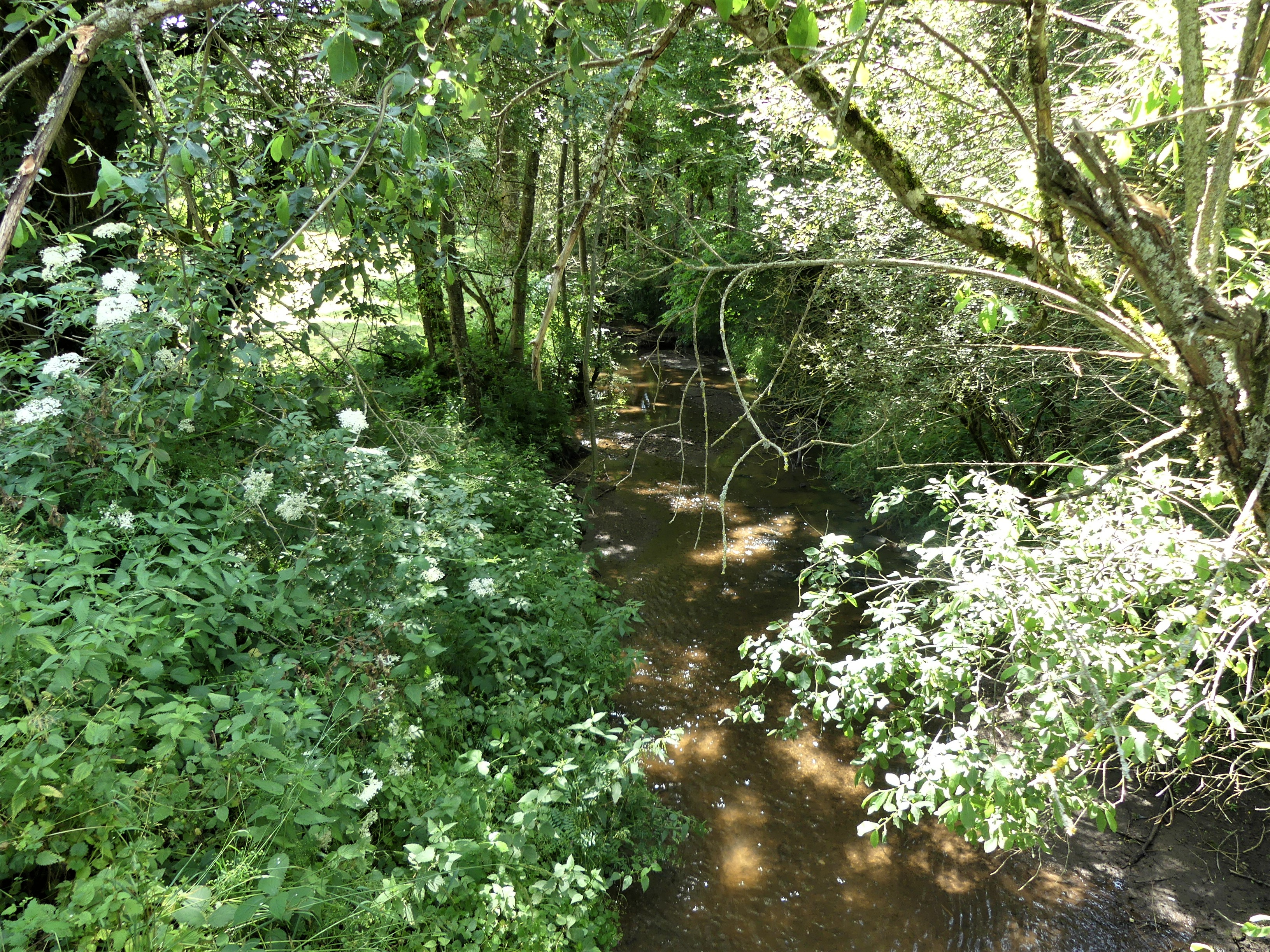 Le ruisseau de Connes au pont de la route départementale 199, Salles-Curan, Aveyron, France. Vue prise en direction de l'amont.